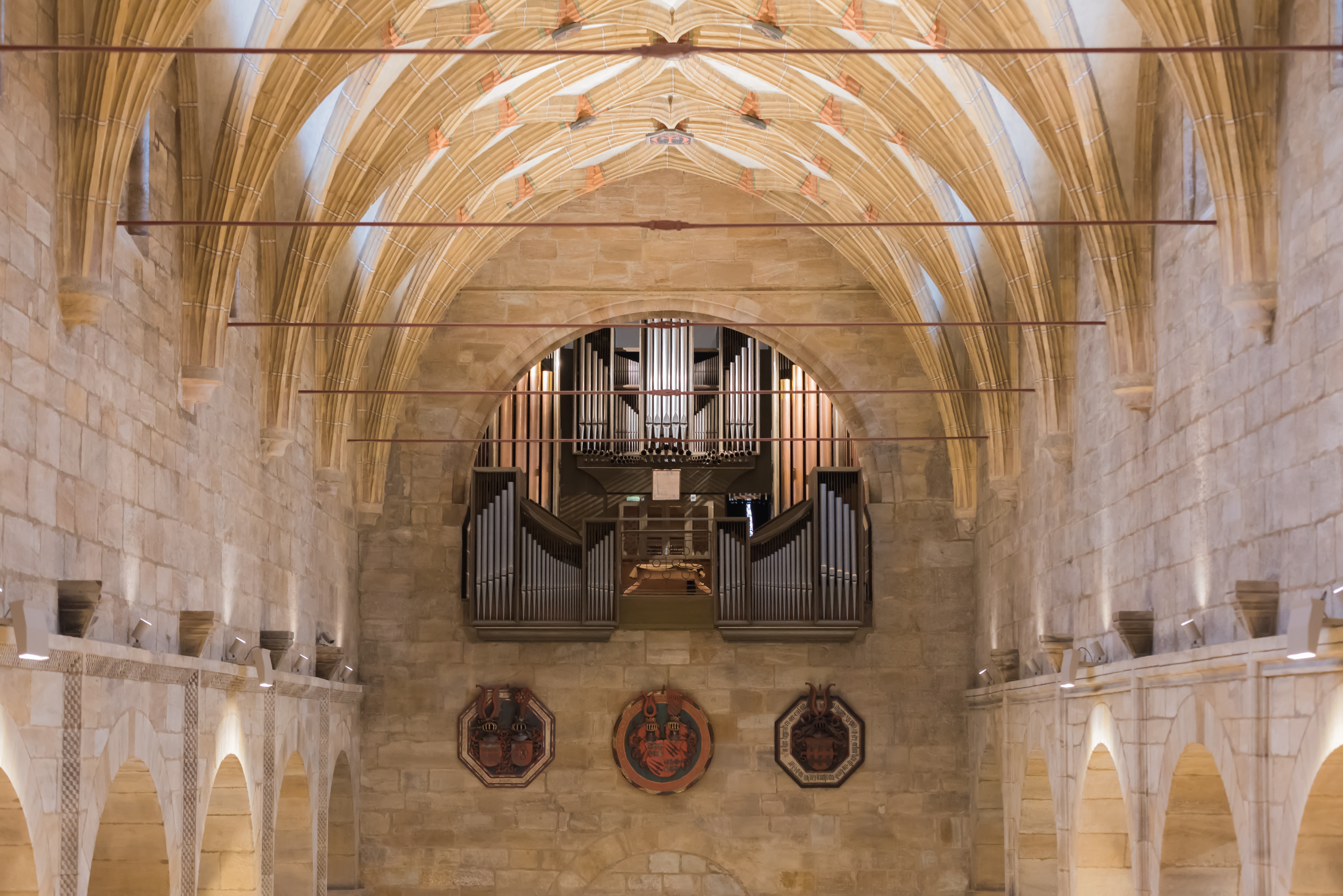 © Michael Regner